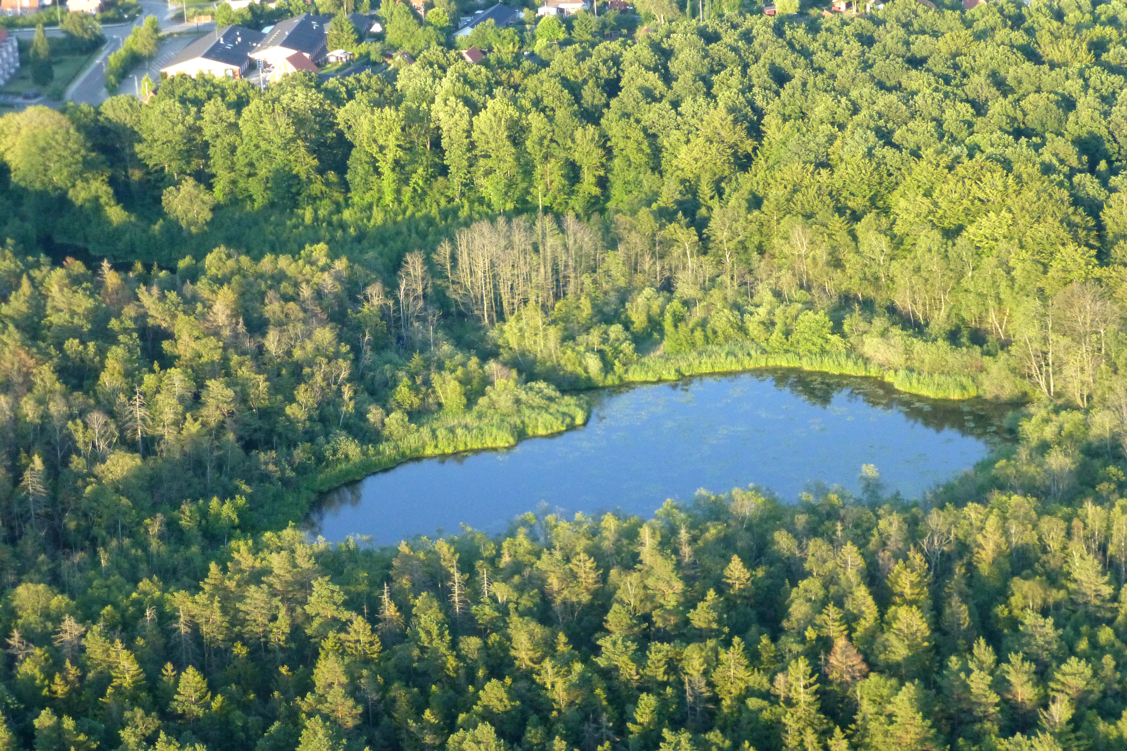 Pøtsø i Lysbro Skov set mod øst